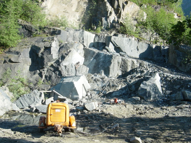 Vistdalitt